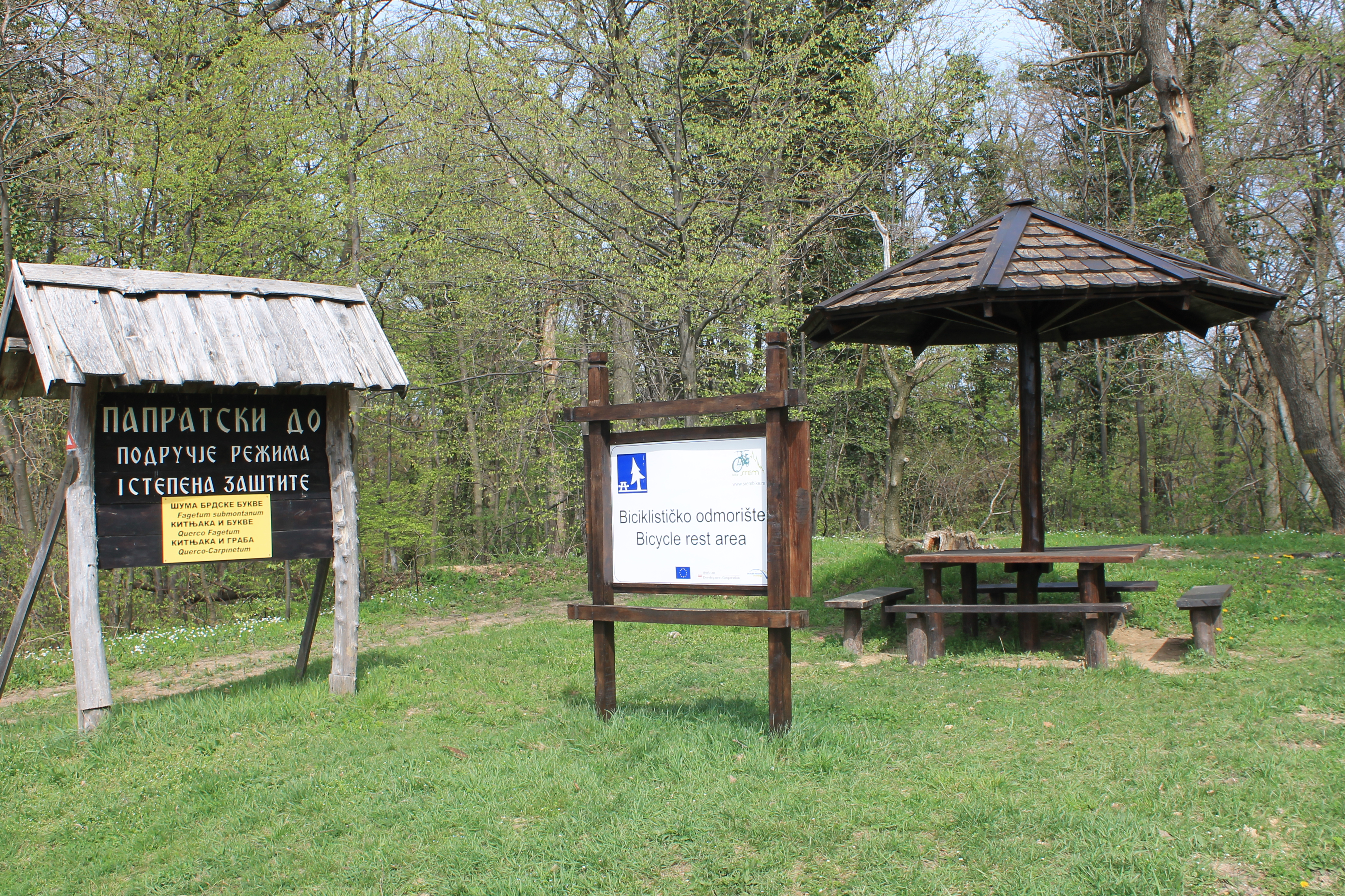 Partizanski put